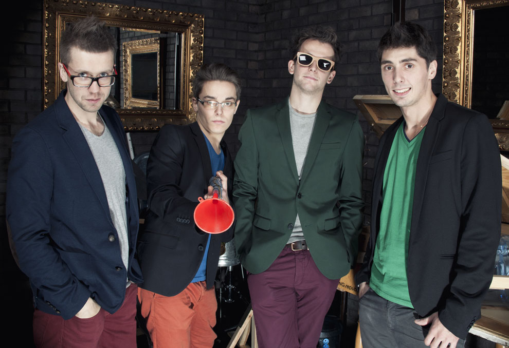 Recyclic Band, Poland